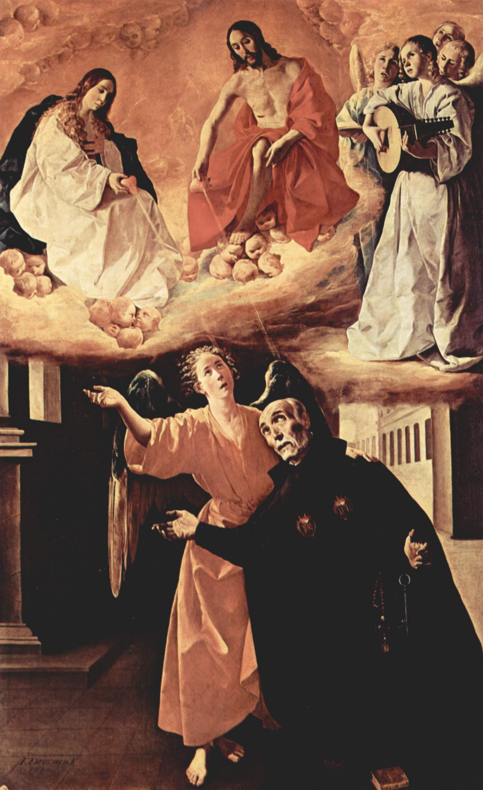 La obra representa al jesuita San Alonso Rodríguez teniendo una visión y contemplando a Jesucristo y a la Virgen María.